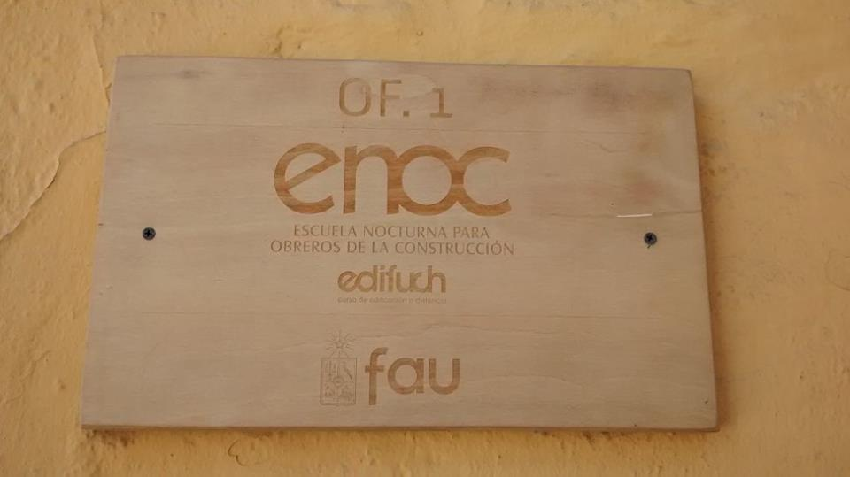 Placa de la Escuela Nocturna para Obreros de la Construcción puesta en la Facultad de Arquitectura de la Universidad de Chile.